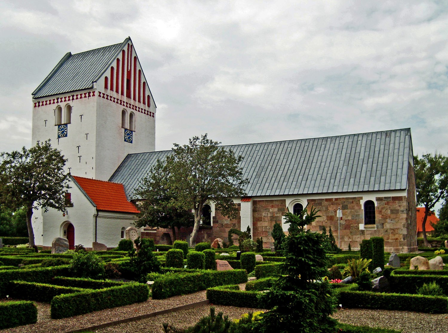 fra sydøst